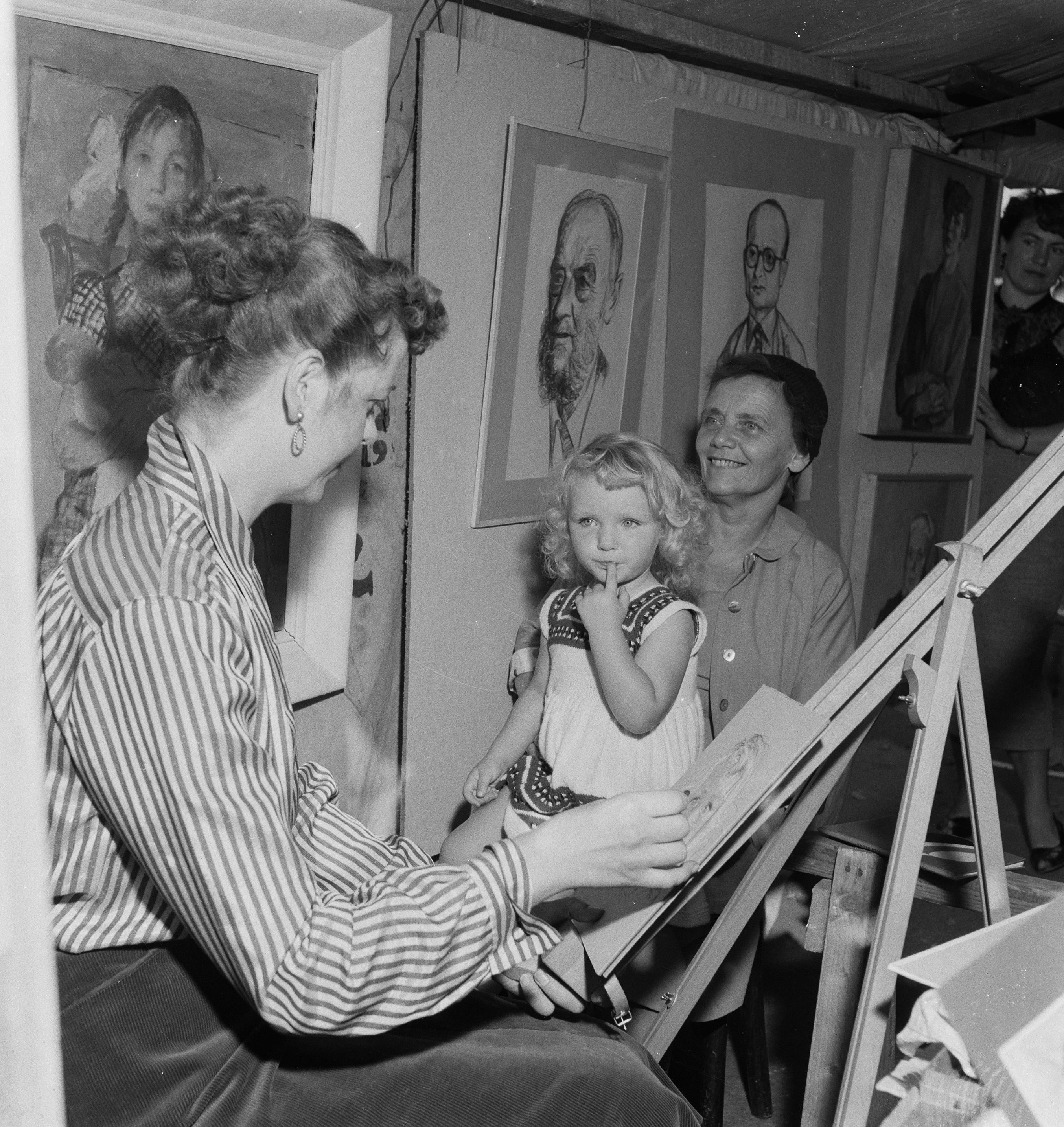 Kunstenaarsmarkt Utrecht, Erika Visser aan het werk